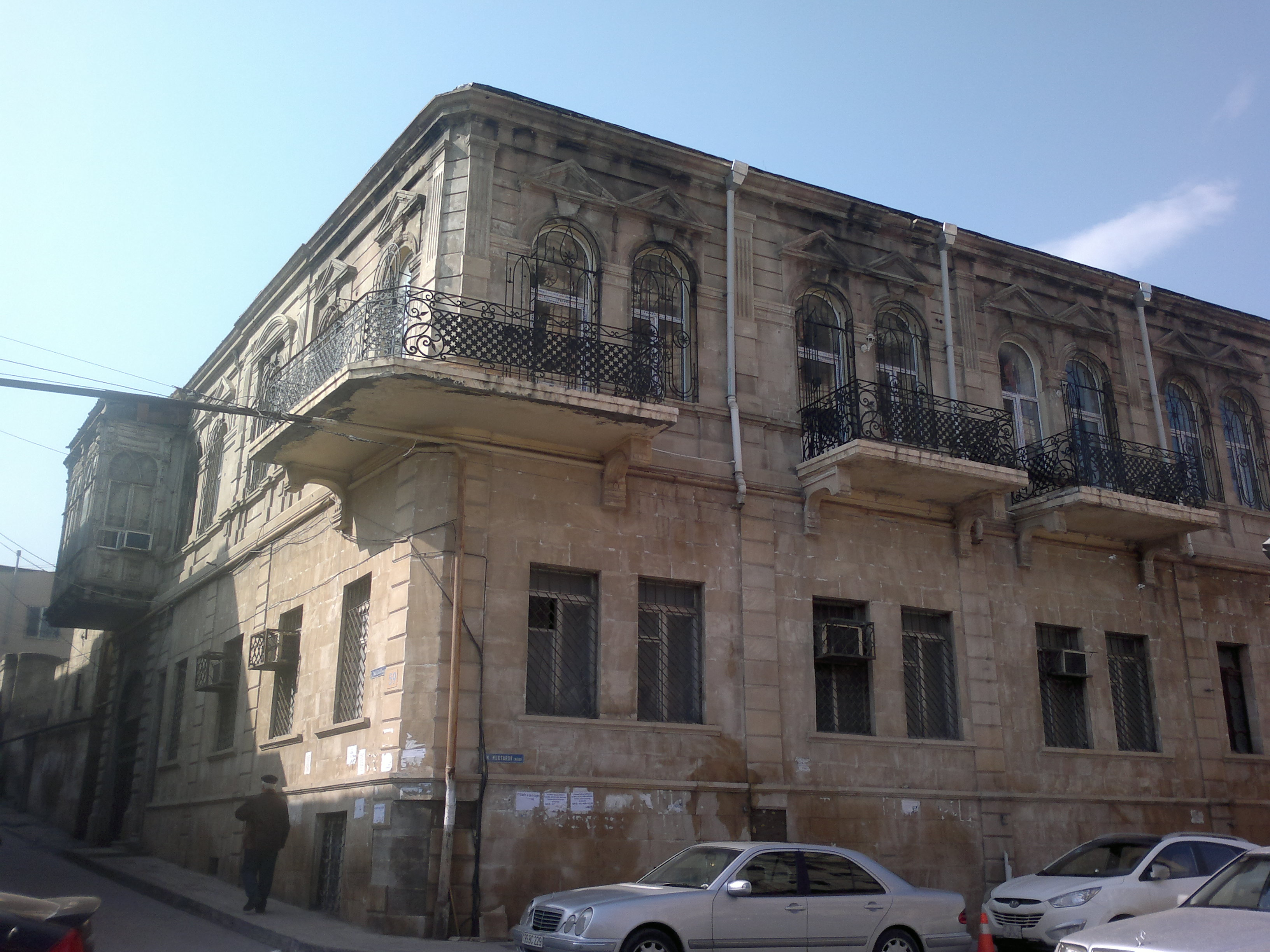 Building on Suleyman Taghizade Street 59